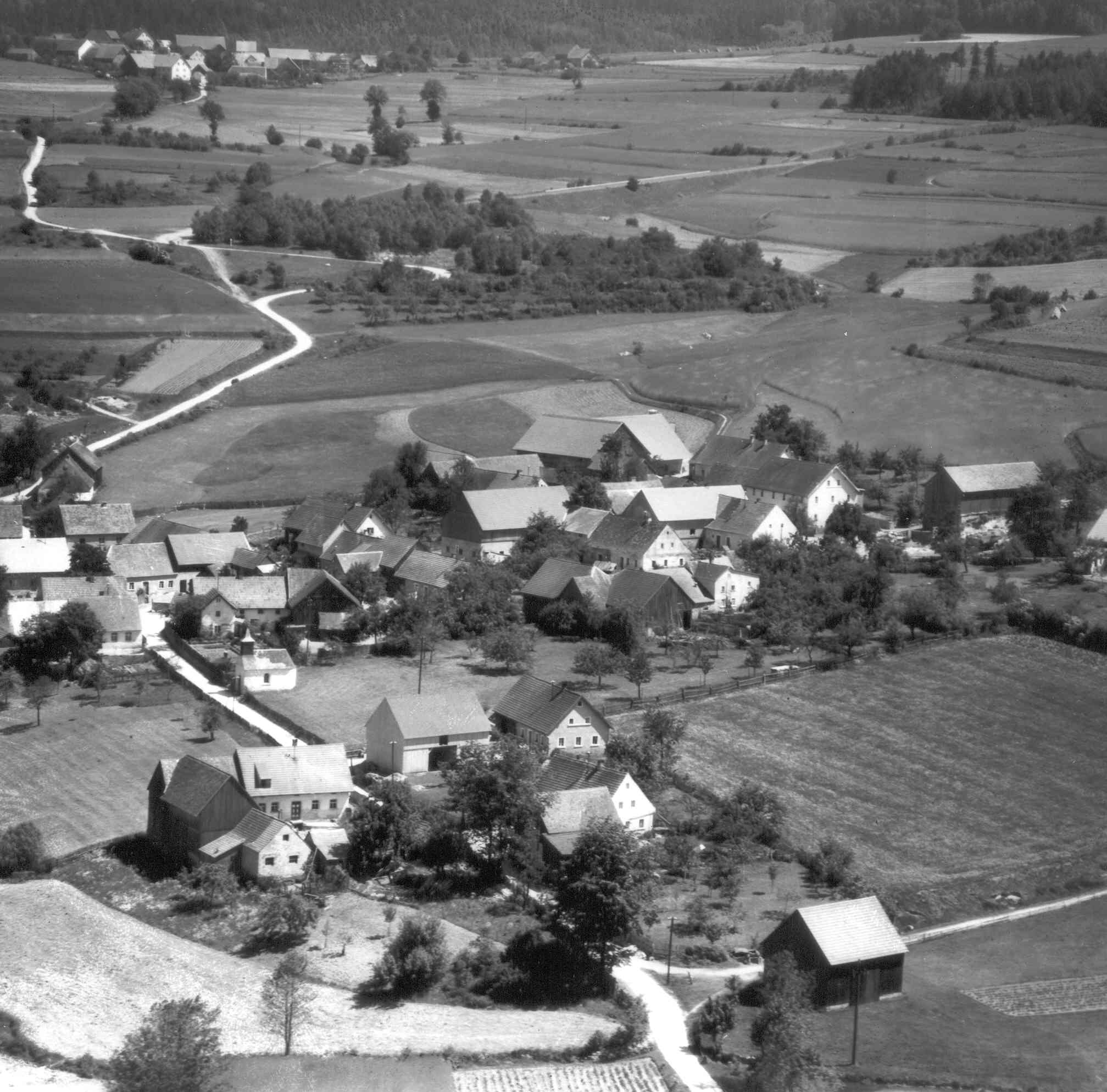 Die Ortschaft Lampenricht im Jahre 1960